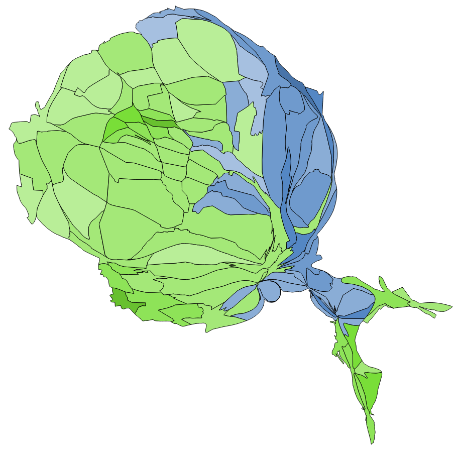 顏色對照表